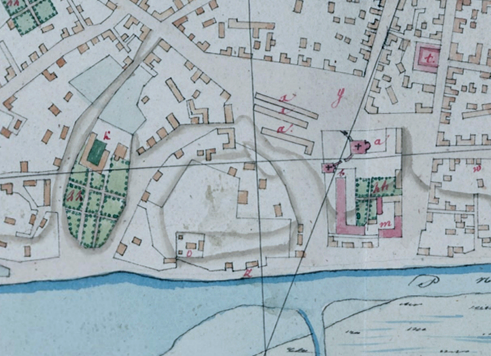 Беларуская (тарашкевіца): Пінск (Pinsk), плян места